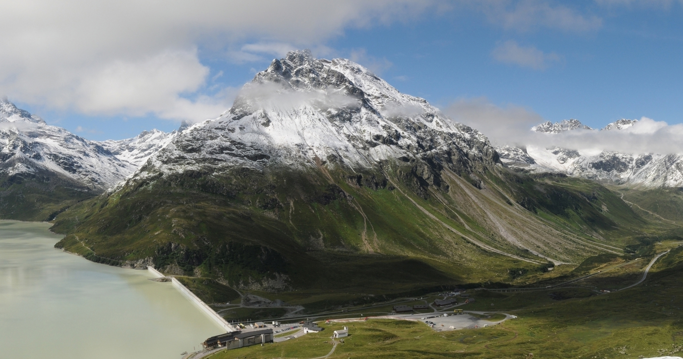 Lobspitzen from NE